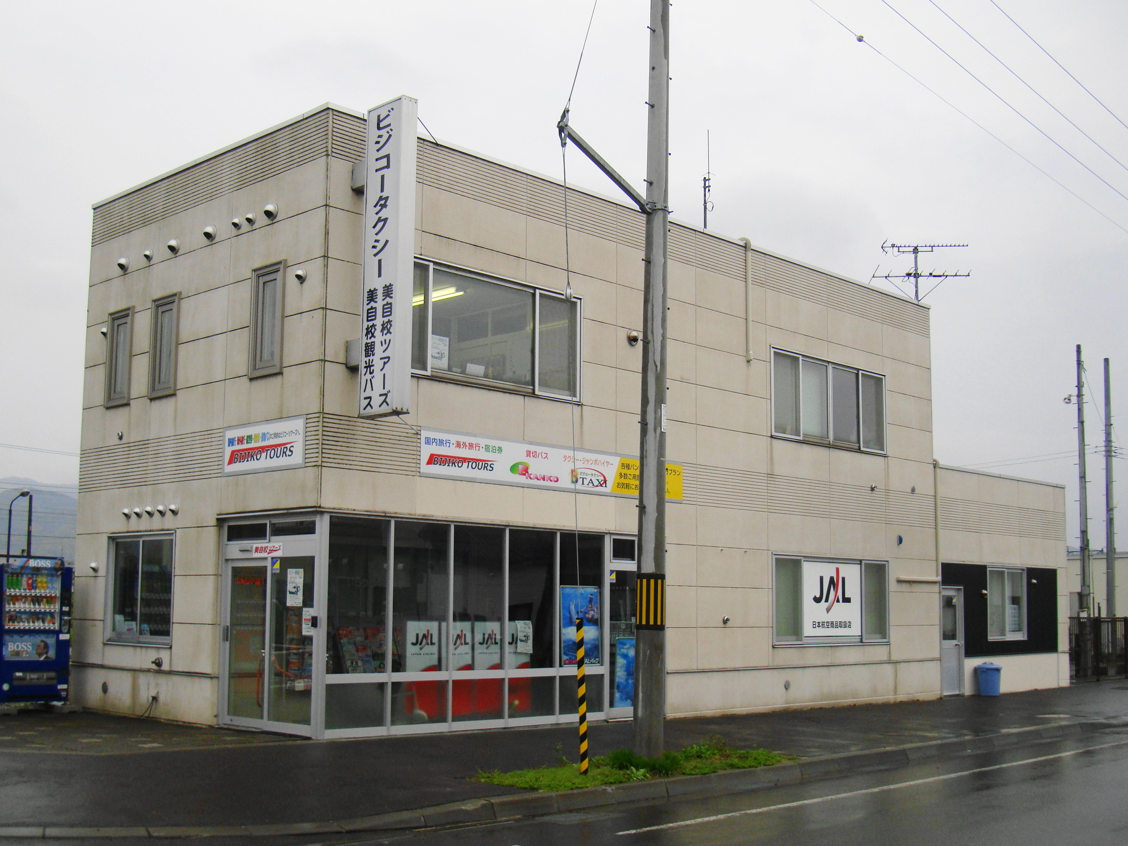 Taxi company